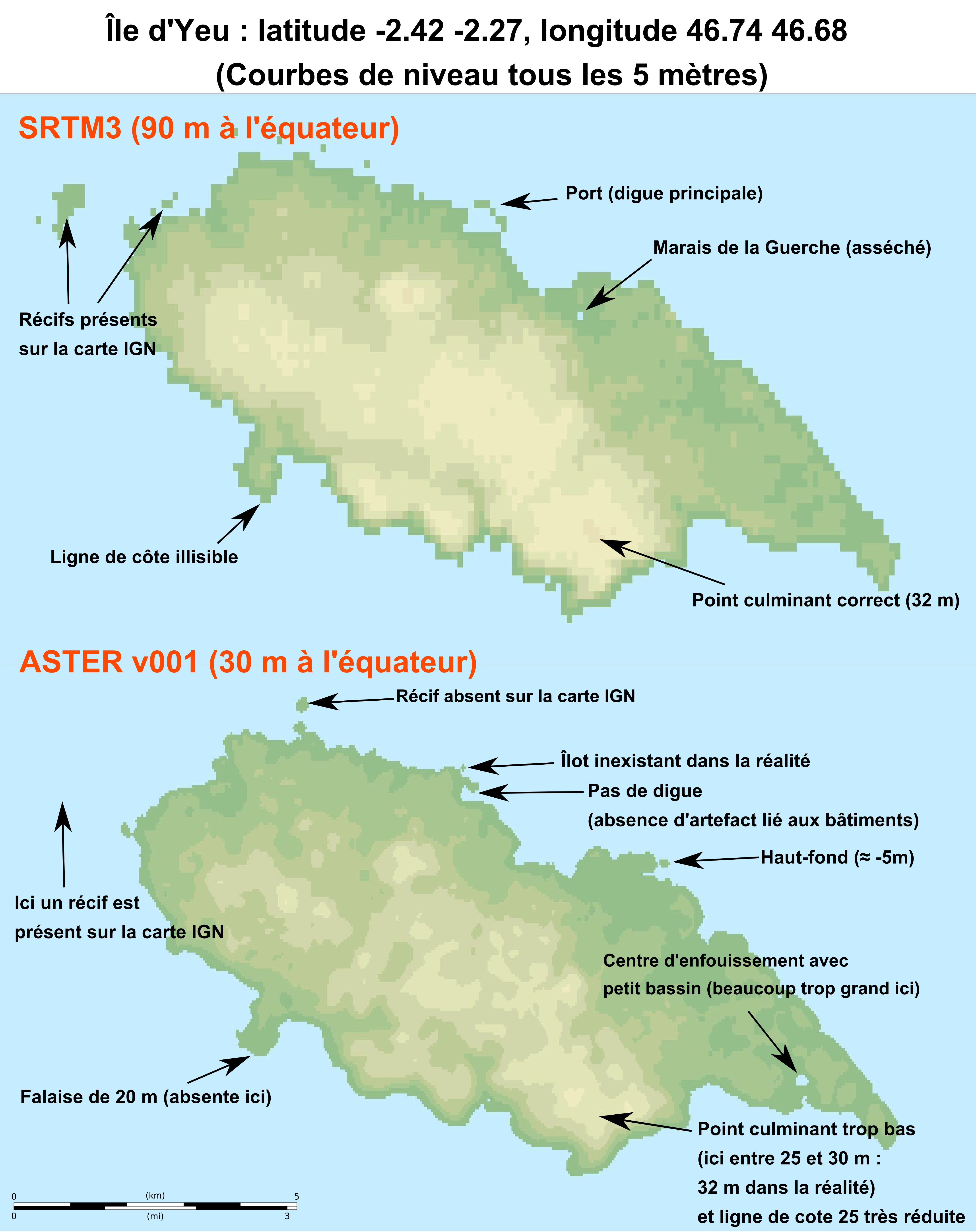 Comparaison des sources de données topographiques SRTM3 (précision : 90m à l'équateur) et ASTER (30m à l'équateur). Logiciels utilisés : QGIS, Inkscape, The Gimp. ASTER GDEM is a product of METI and NASA.